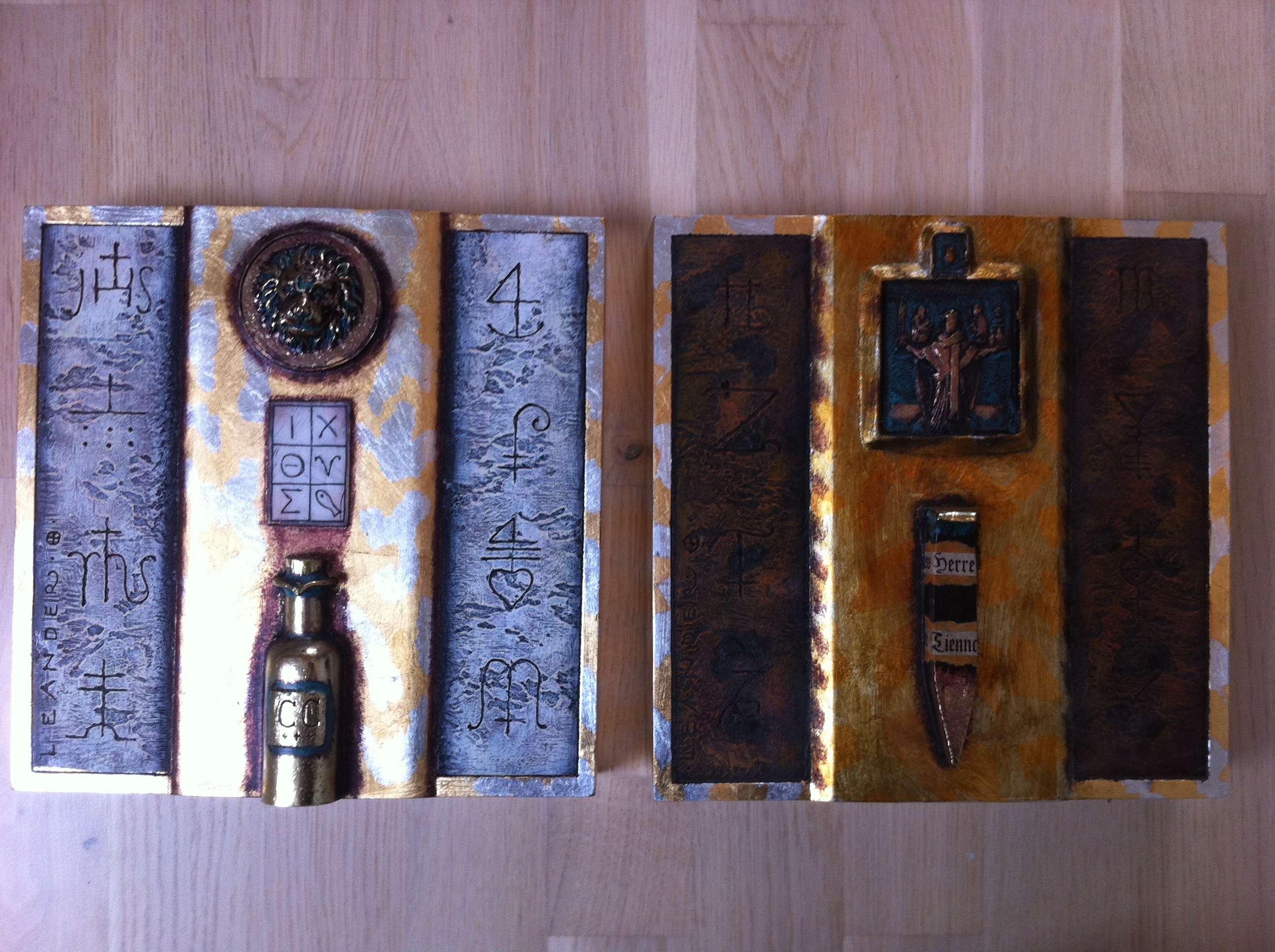 to af Rikki Tikkis Ikoner. De er lavet af virksomheden Rikki Tikki Company